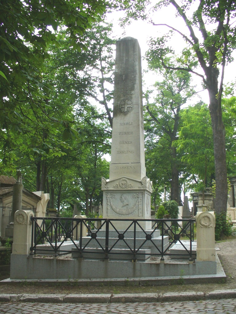 Tombe du maréchal Masséna au Père-Lachaise (Paris)